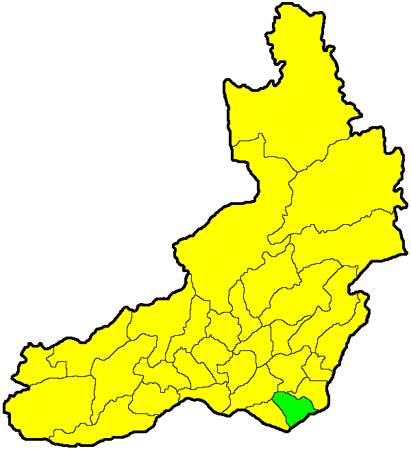 Краснокаменский район на карте Забайкальского края